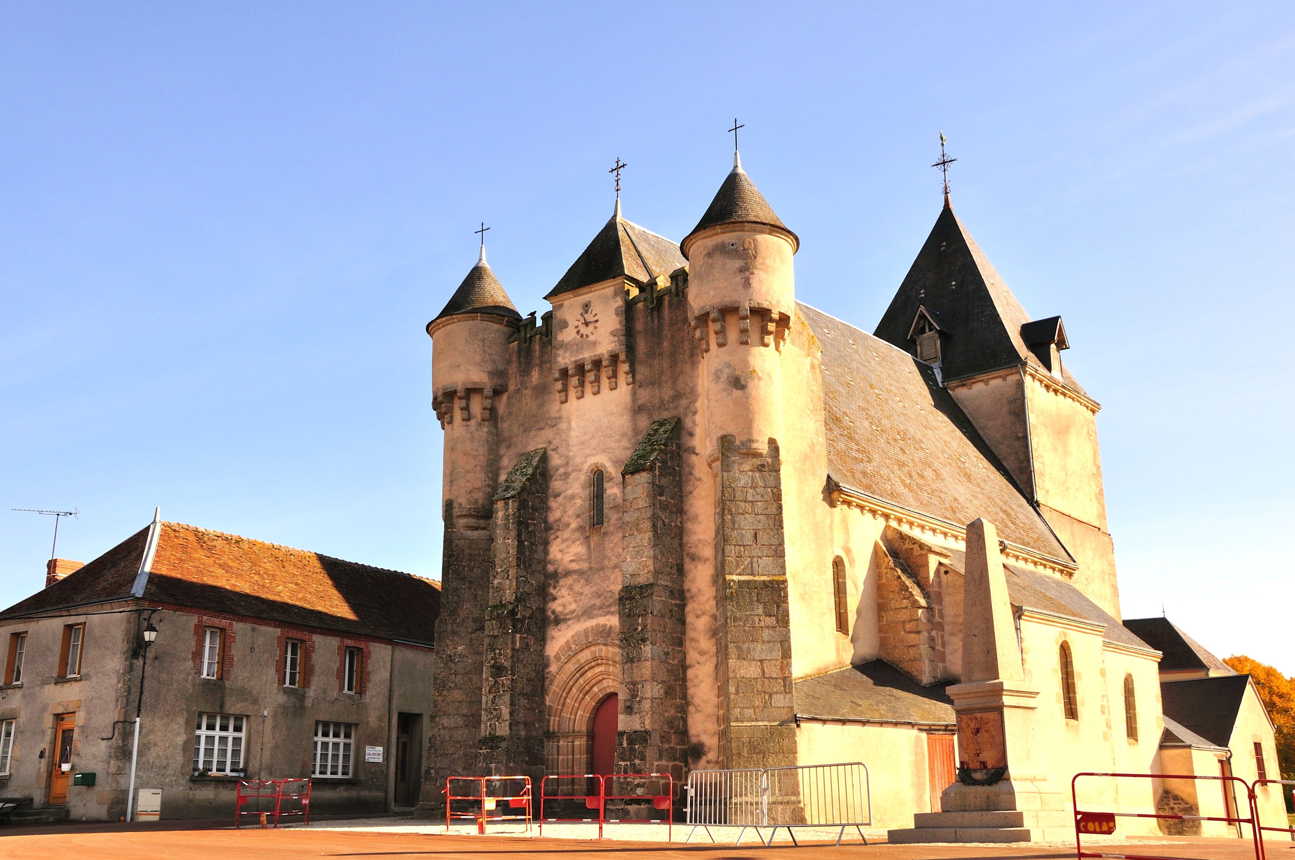 This building is en partie classé, en partie inscrit au titre des Monuments Historiques. .